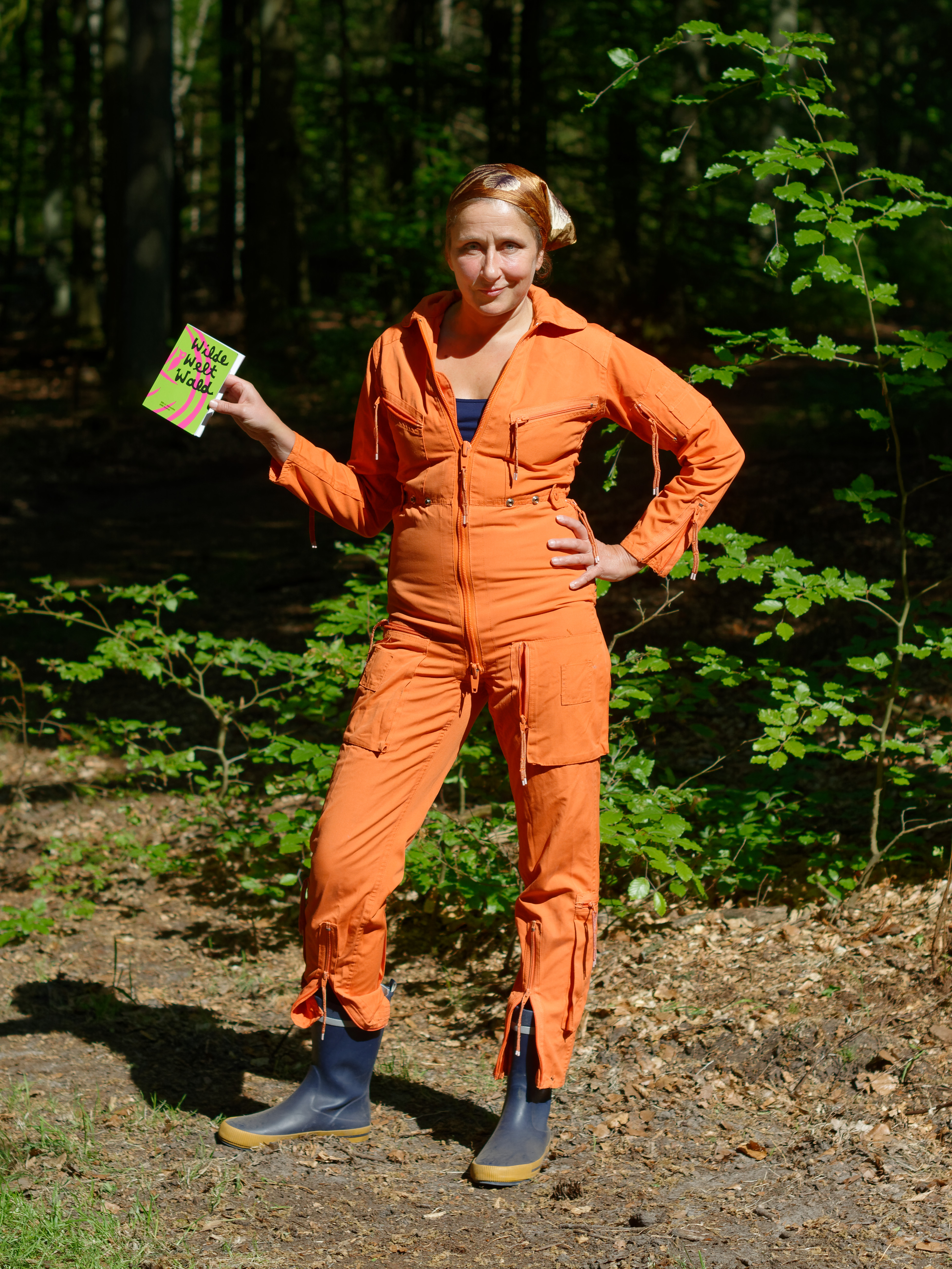 Barbara Philipp bei der Theater Performance "Wilde Welt Wald" im Mai 2018. Wilde Welt Wald, war ein Projekt von BBM (Beobachter der Bediener von Maschinen), der Galerie Divan sowie dem Biosphären‐Reservat Flusslandschaft Elbe, im Dreiländereck: Brandenburg, Mecklenburg‐Vorpommern und Niedersachsen, im Mai 2018. (